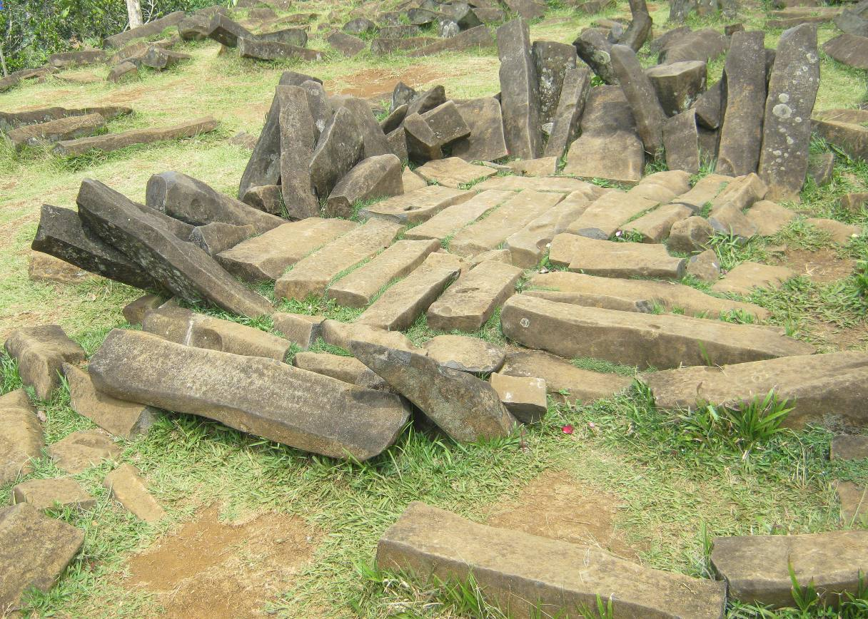 Situs Megalitikum Gunung Padang, Cianjur